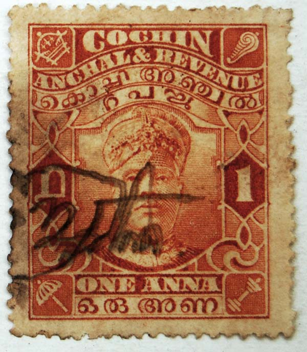 കൊച്ചി അഞ്ചൽ തപാൽ സ്റ്റാമ്പ്. ഒരു അണ വിലയുള്ളത്. ഇപ്പോൾ നിലവിലില്ല. റദ്ദാക്കൽ സീലിനു പകരം തൂവൽ പേനകൊണ്ട് കയ്യൊപ്പിട്ടിരിക്കുന്നത് ശ്രദ്ധിക്കുക! കടപ്പാട്: തൃശ്ശൂർ, സജു മാത്യുവിന്റെ ശേഖരത്തിൽ നിന്നും പകർത്തിയത്.